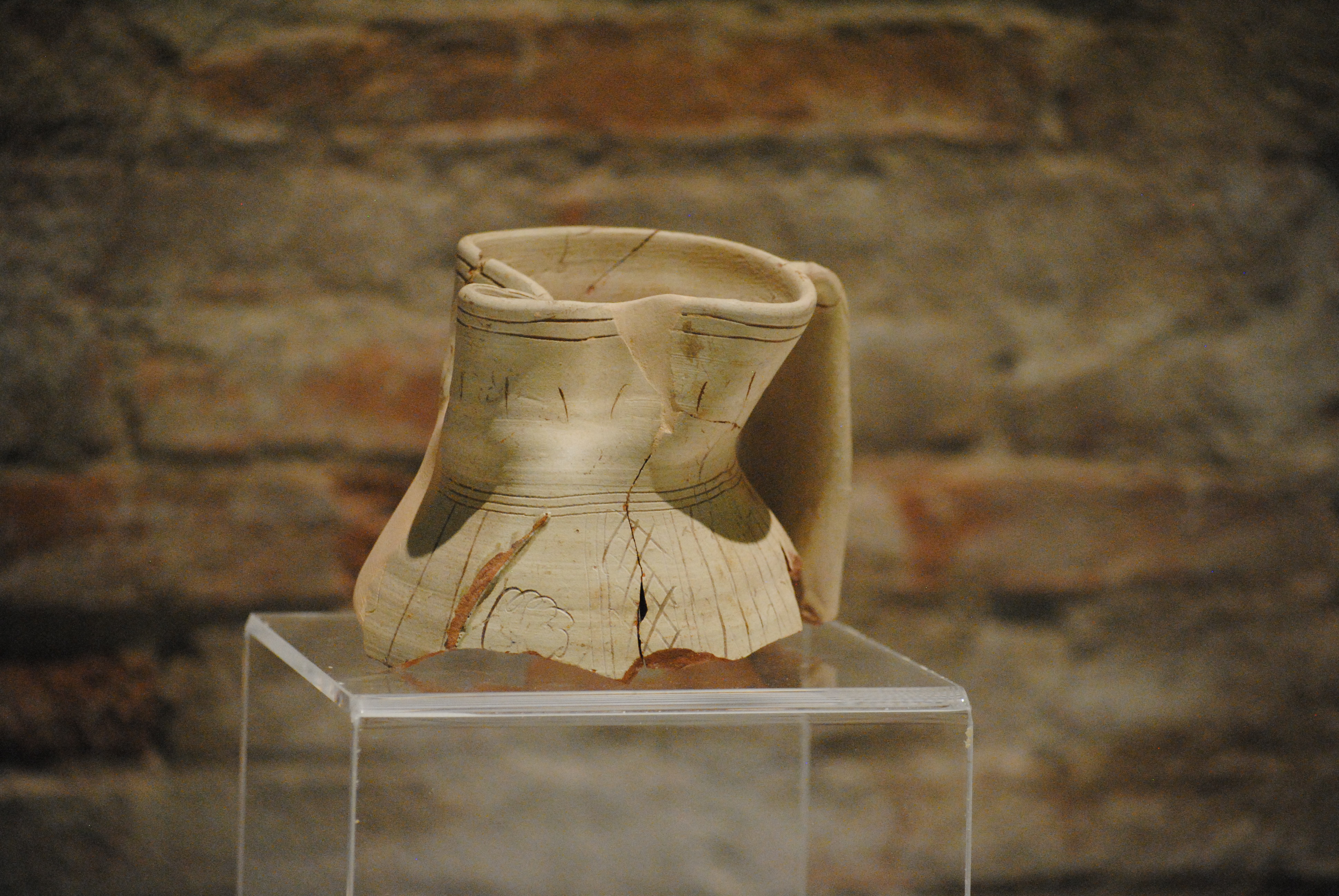 Boccale ingobbiato e graffito a punta (scarto di prima cottura), databile tra il 1500 - 1530 (restituito dallo scavo di villa Quercioli, Pisa) - Museo nazionale di San Matteo.